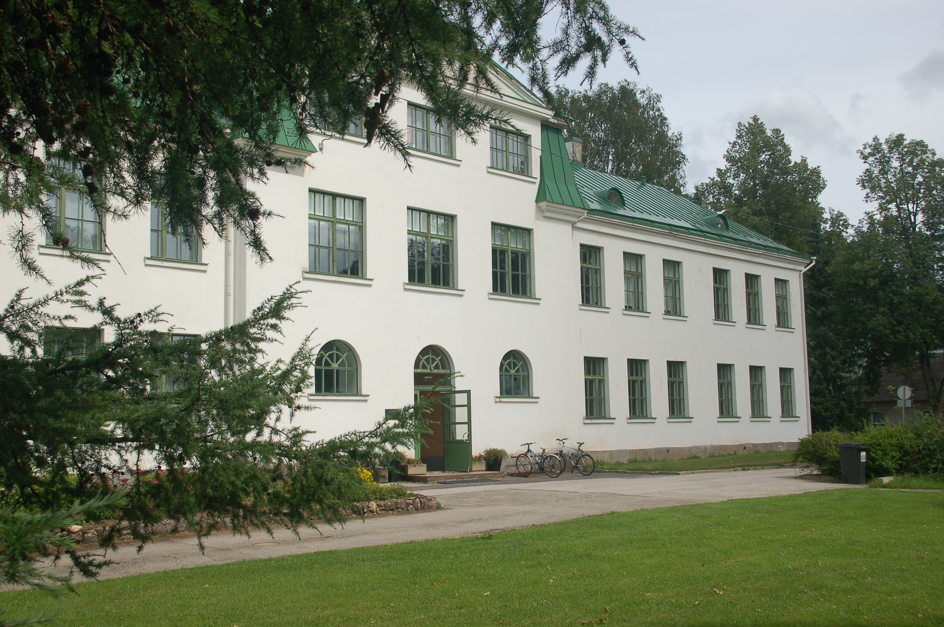 Tõrva Linnaraamatukogu